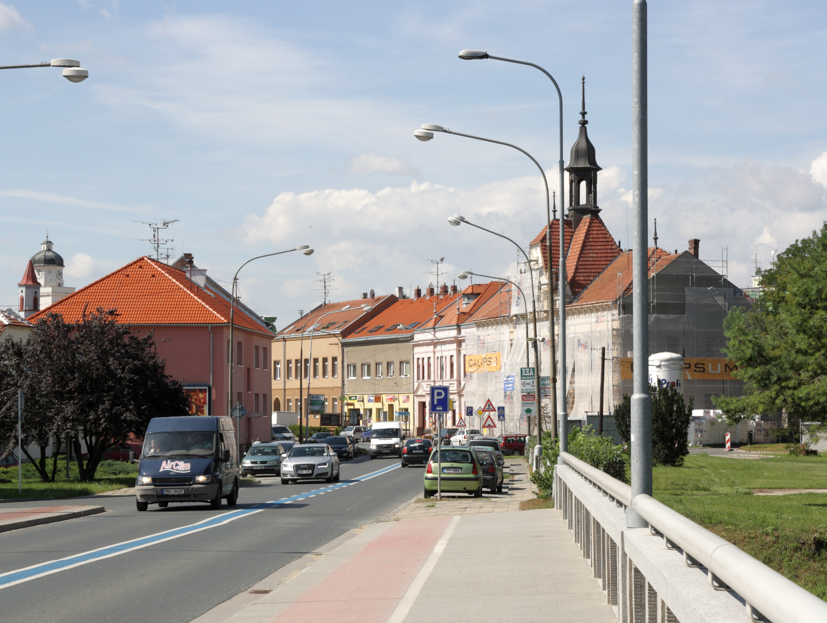 Pohořelice - ulice Brněnská.